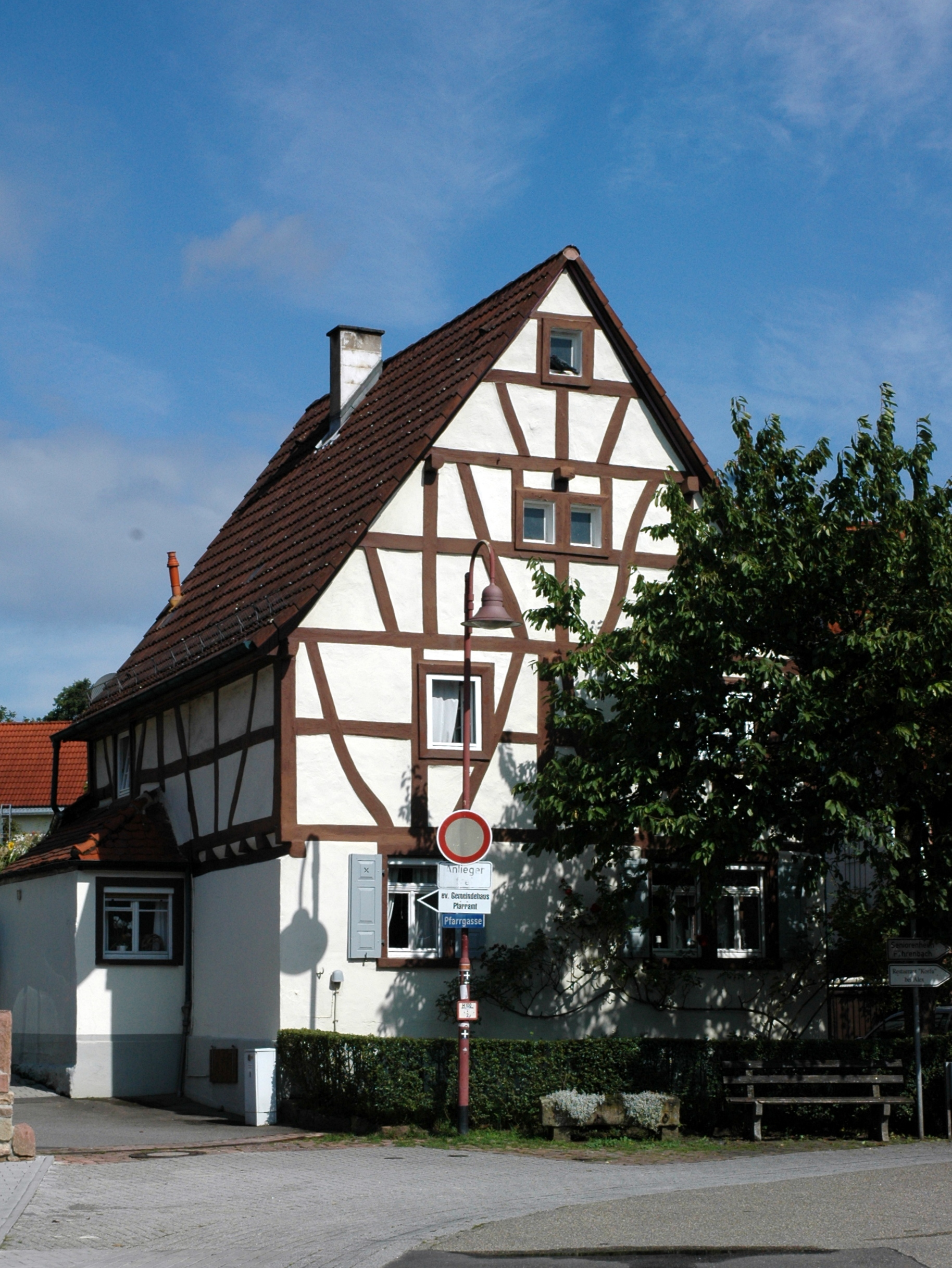 Oberdorfstrasse 17 in Bammental